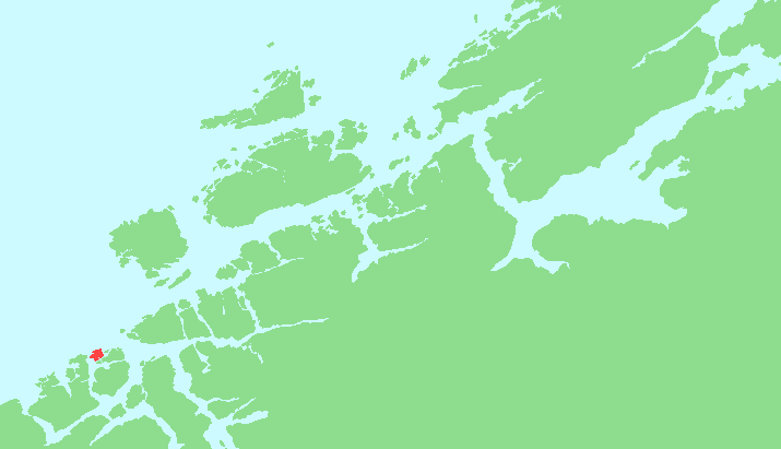 Locator map of Kirklandet, Møre og Romsdal, Norway